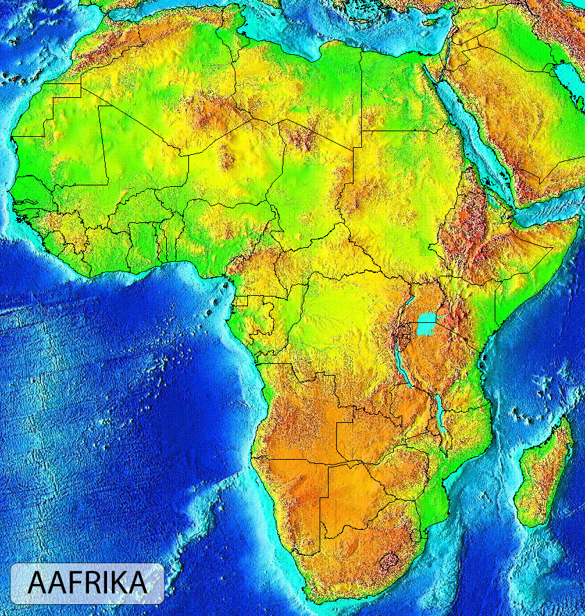 Selgitan, mida tähendab omatehtud. Minu lisatud on riikide piirid, seda tegin GIS programmiga MapInfo. Reljeefimudel on USGS kodulehelt tükkhaaval tõmmatud ning Photoshopiga ühtseks pildiks kokku kleebitud. Loodan, et sellele kaardile on antud piisavalt lisaväärtust ja keegi ei saa öelda, et see on autoriõiguse rikkumine. Igaljuhul täpselt sellist kaarti mujal netis ei ole. Kaart on ruutlaba, LAT/LON projektsioonis.